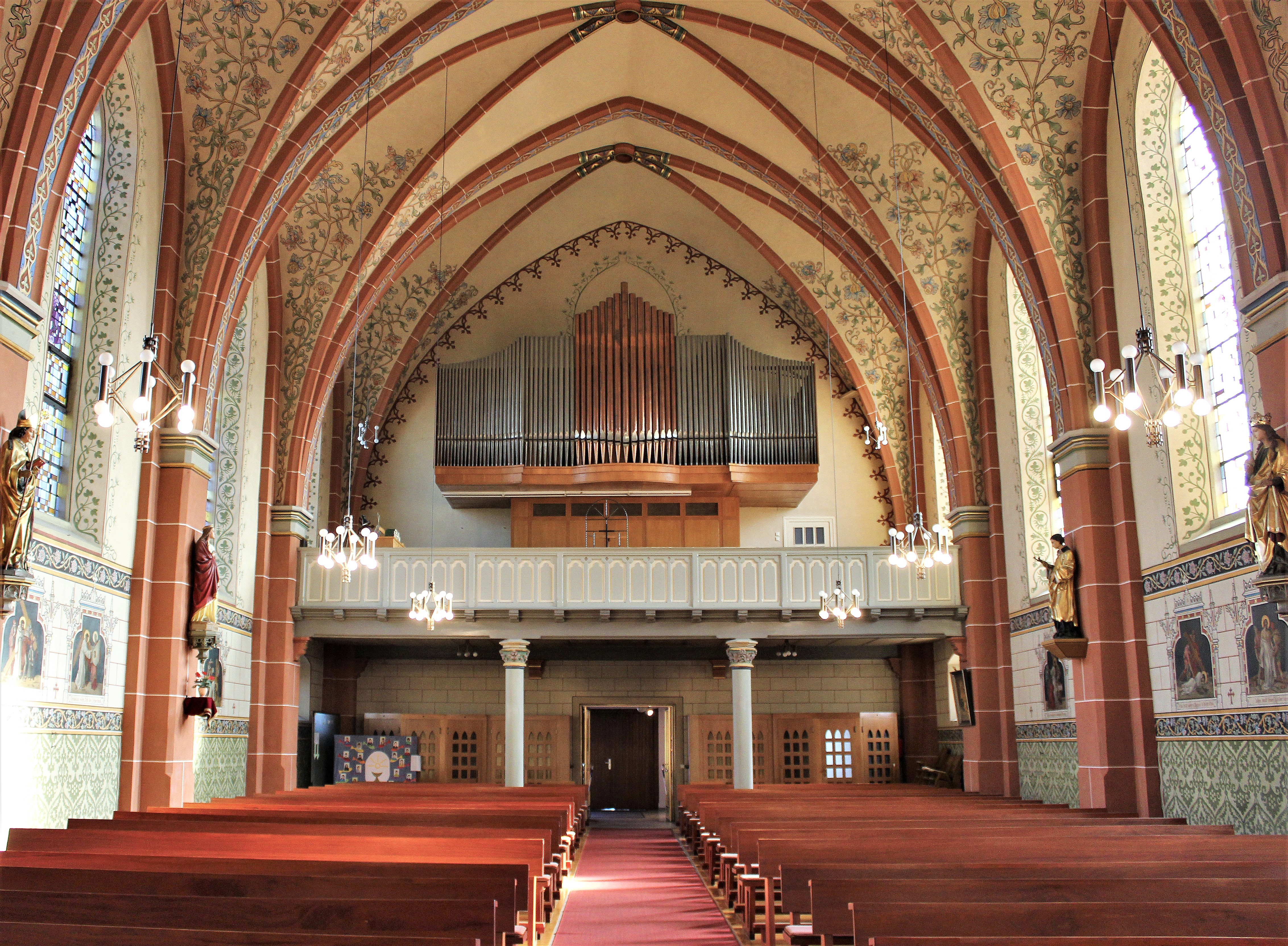 Blick ins Innere der katholischen Pfarrkirche St. Leodegar in Düppenweiler, einem Ortsteil der Gemeinde Beckingen, Landkreis Merzig-Wadern, Saarland